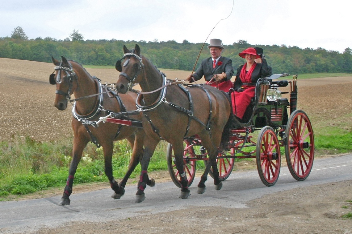 Attelage en pair avec colliers